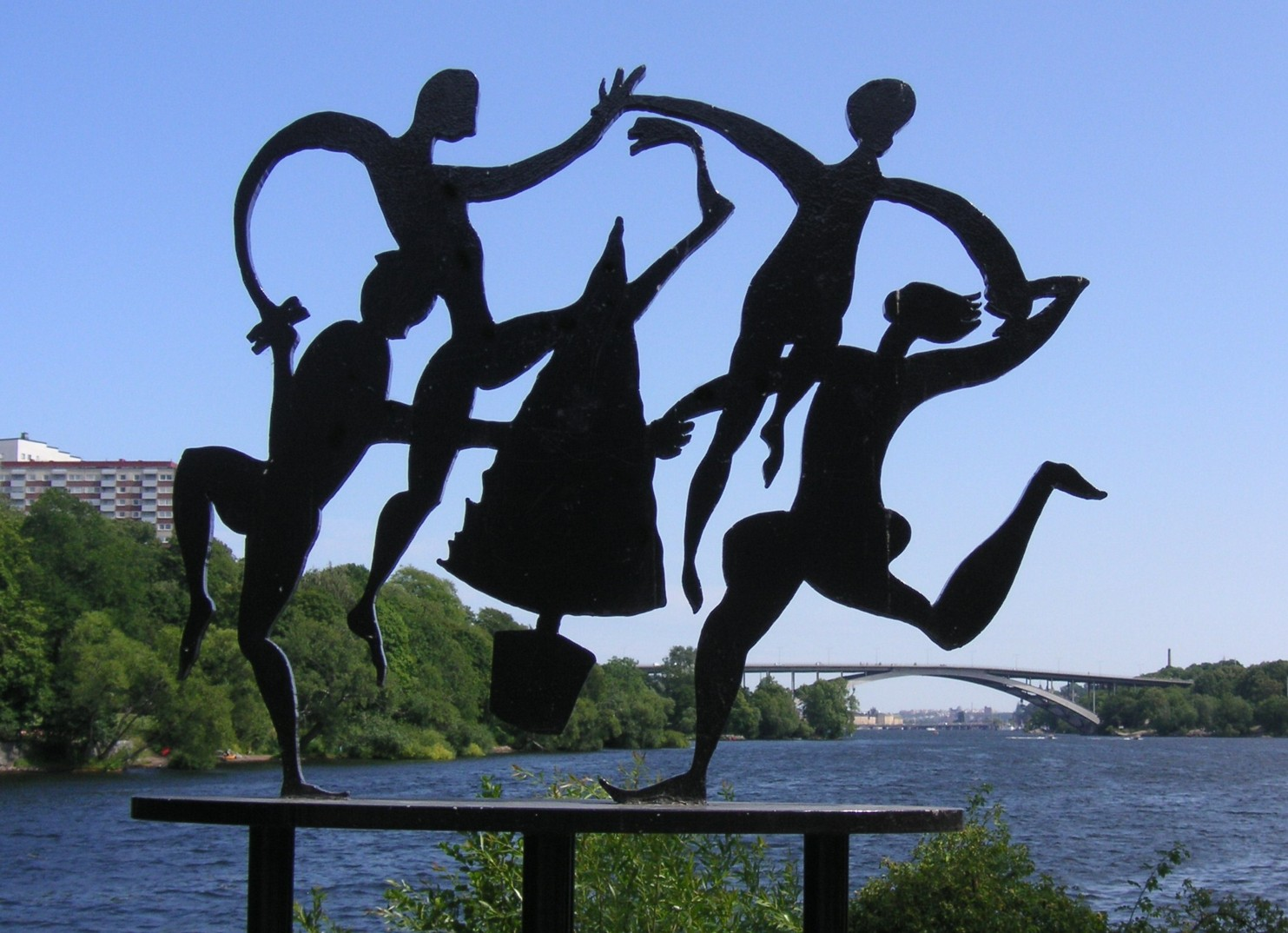 Fibben Halds skulptur "Dansen kring granen" på Lilla Essingen i Stockholm